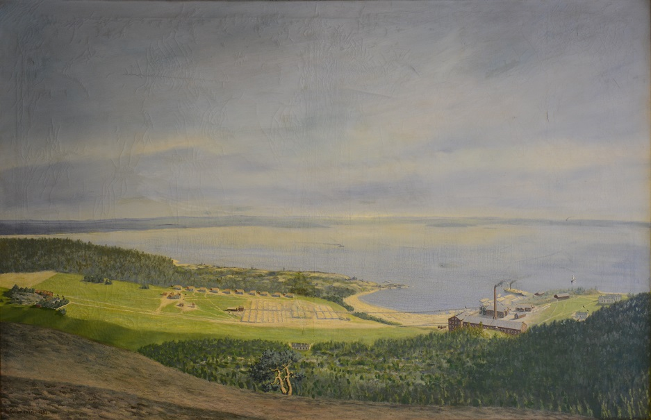 Utsikt over Tofte 1901